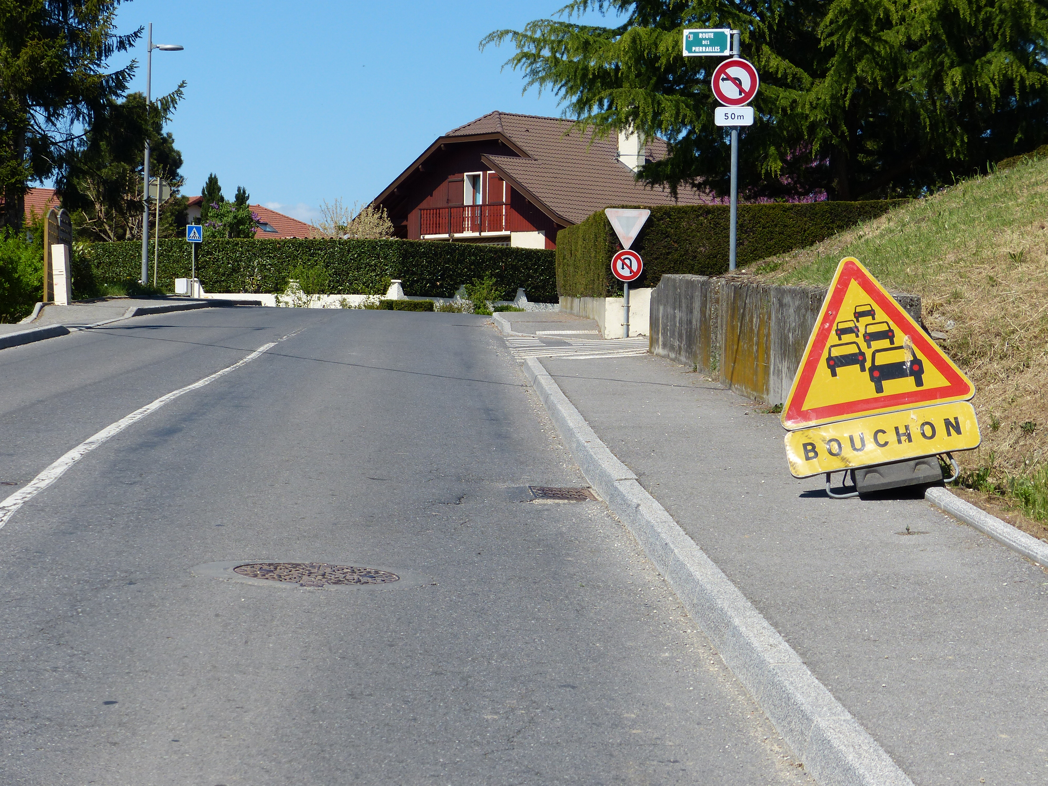 Panneau AK30 et panonceau KM9, D202, Arthaz-Pont-Notre-Dame, Haute-Savoie, France.